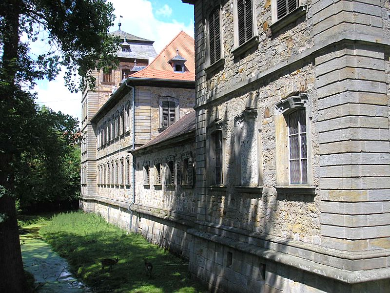 Schloss Burgpreppach (Landkreis Haßberge, Unterfranken) / Burgpreppach Castle, Franconia, Germany. Westseite mit Graben / View from west with the moat. Eigene Aufnahme, Juni 2006 / Own photo, June 2006